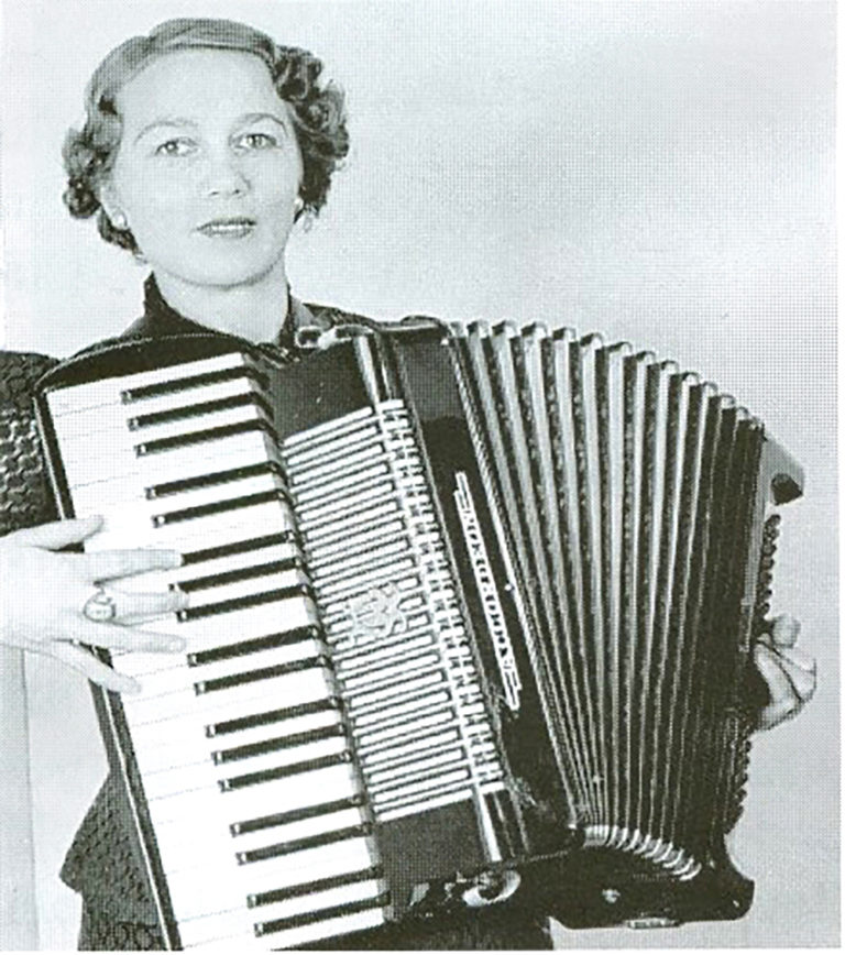 Signe Gustafsson, dragspelare